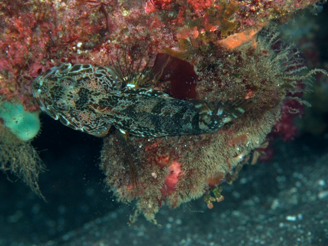 アナハゼ Pseudoblennius percoides